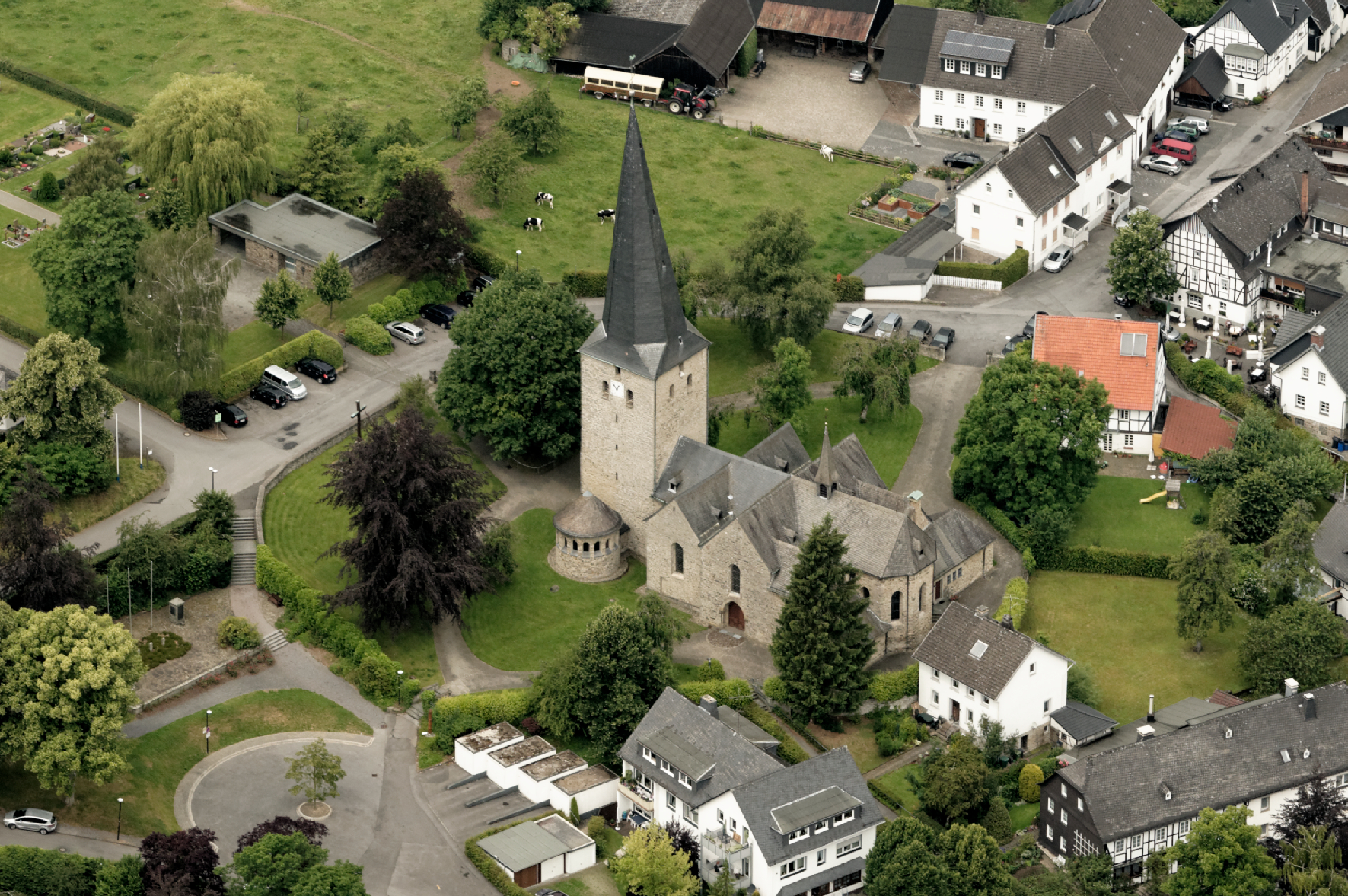 Fotoflug Sauerland Nord. Sundern (Sauerland): Kirche Stockum mit Umgebung The making of this document was supported by the Community-Budget of Wikimedia Germany.